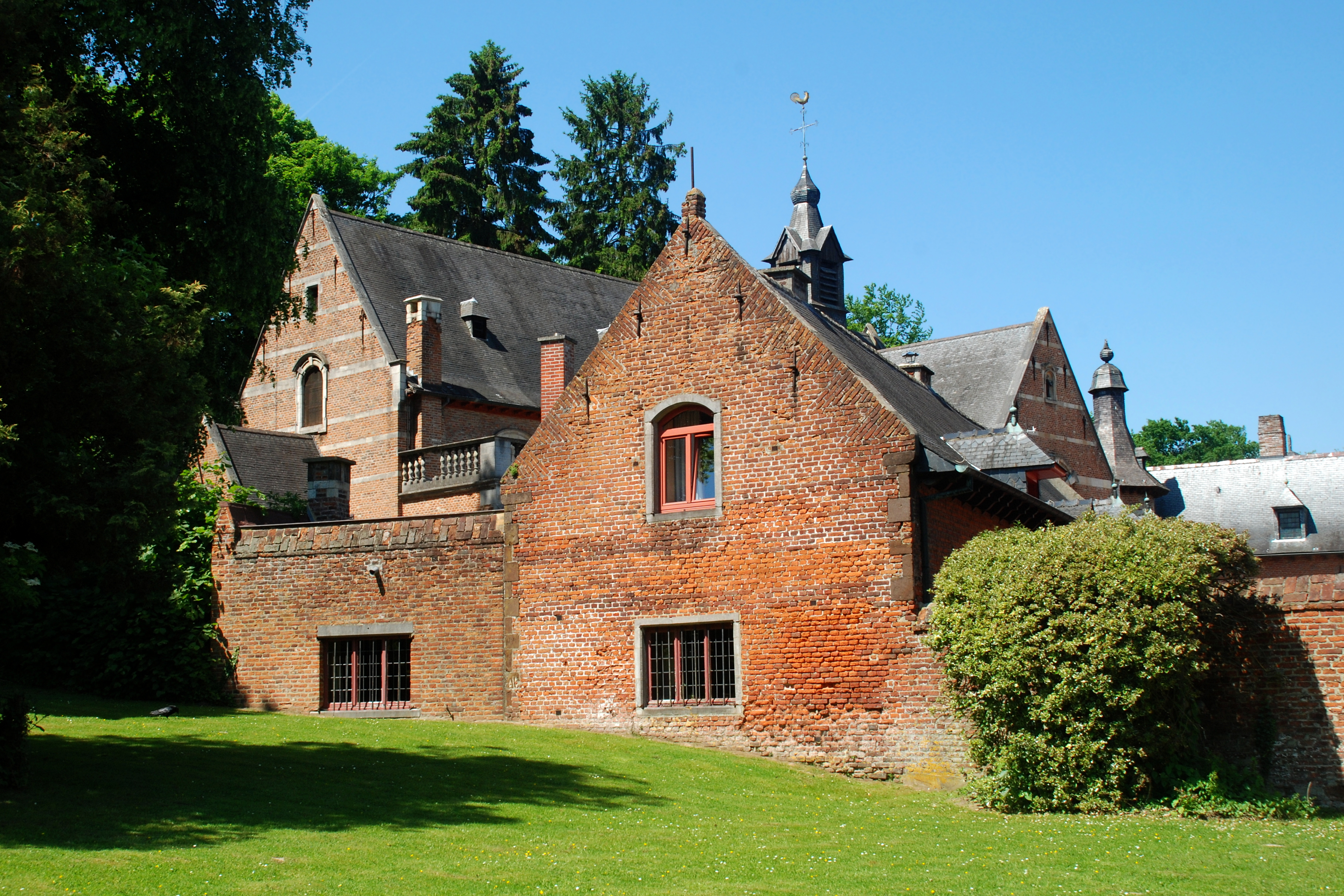 Belgique - Brabant wallon - Château de Rixensart